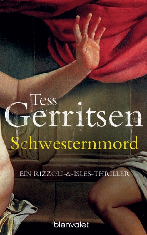 Tess Gerritsen: Schwesternmord. Blanvalet, München 2006. DNB; bearbeiteter Ausschnitt aus Artemisia Gentileschi: Susanna und die Ältesten (1610); Arm des Ältesten entfernt, dafür Oberschenkel der Susanna rechts im Bild ergänzt